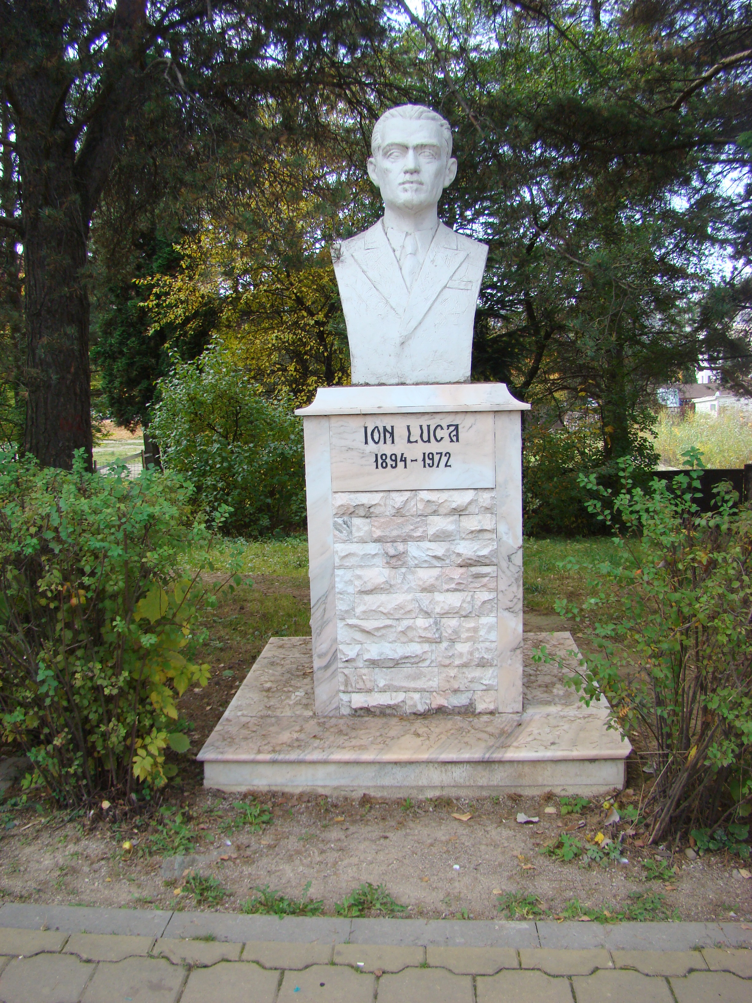 Grup statuar: Mihai Eminescu, Ion Luca Caragiale, Mihail Sadoveanu, George Enescu, Ciprian Porumbescu, Mihail Kogălniceanu, Costache Negri, Alecu Russo; municipiul Vatra Dornei, în parcul stațiunii balneare